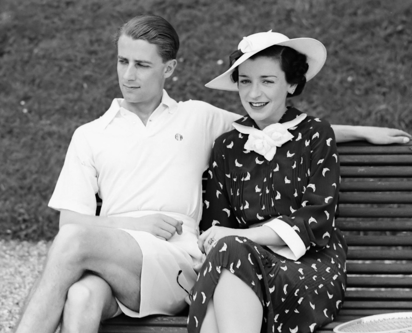 Tenniswedstrijd Frankrijk-Engeland op Roland Garros, Bunny Austin (Brits tennisspeler) met vrouw 1936